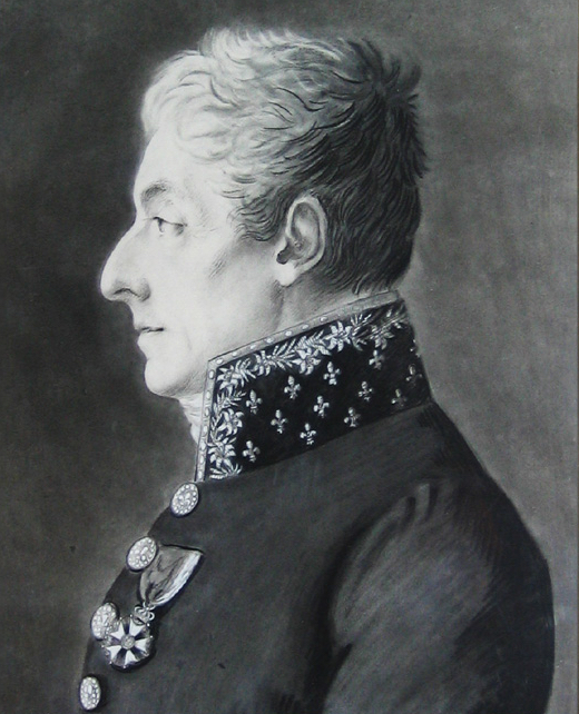 Portrait du vicomte Charles-Gilbert Morel de Vindé (1759-1842) Tableau au château de La Motte-Tilly